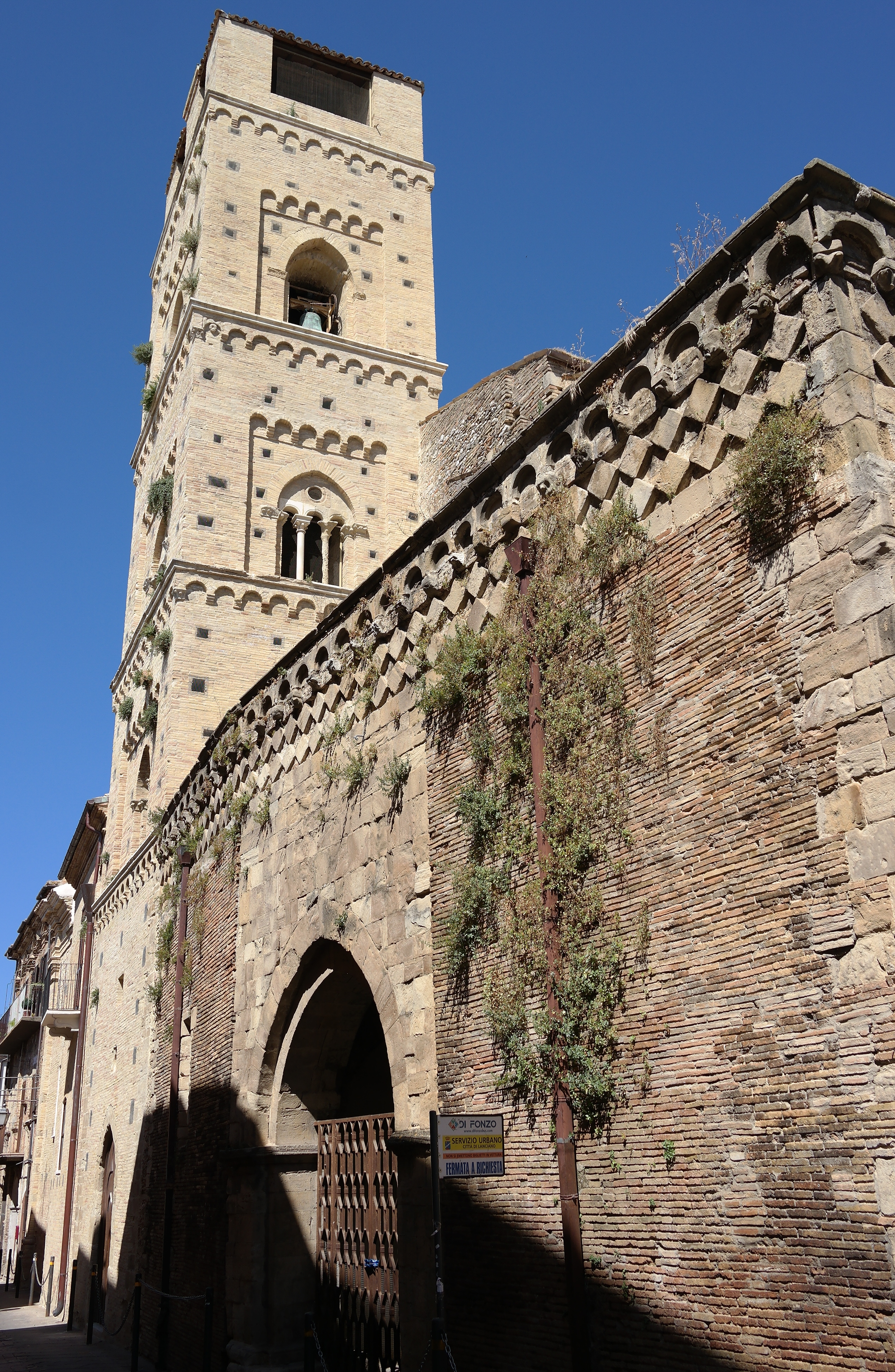 Facciata romanica della Chiesa di Santa Maria Maggiore a Lanciano